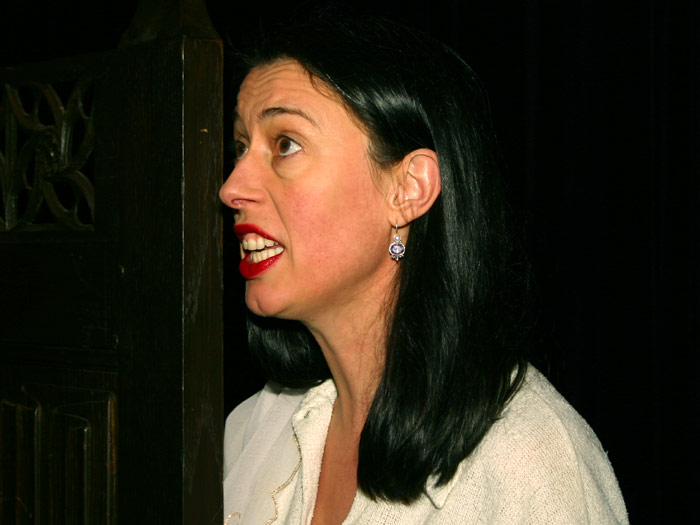 Adelheid Roosen